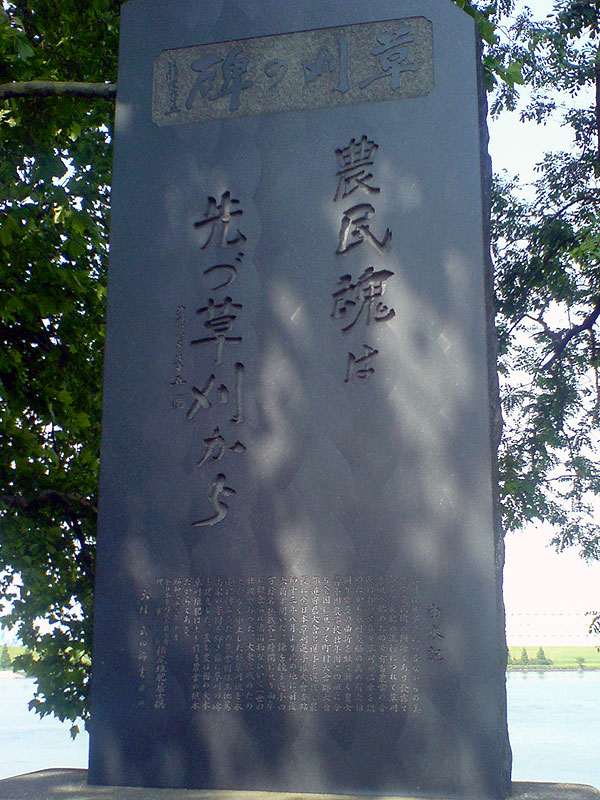 草刈の碑（岩淵水門公園内）